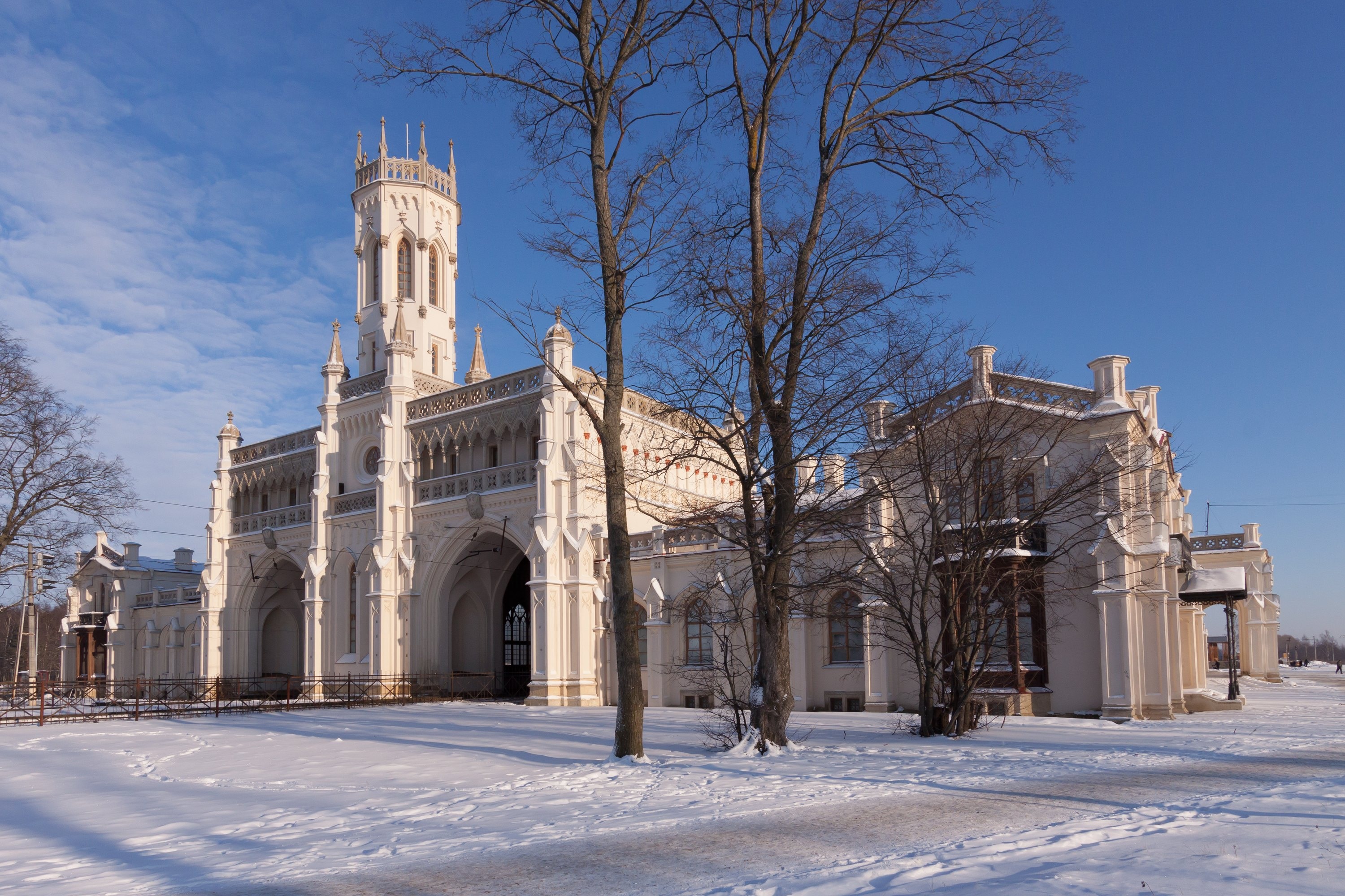 Вокзал железнодорожной станции «Новый Петергоф» (Санкт-Петербург и Лен.область, Петергоф, ж. -д. ст. "Новый Петергоф")